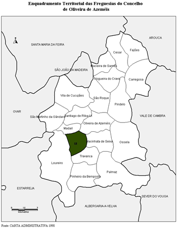 Imagem prÃ³pria